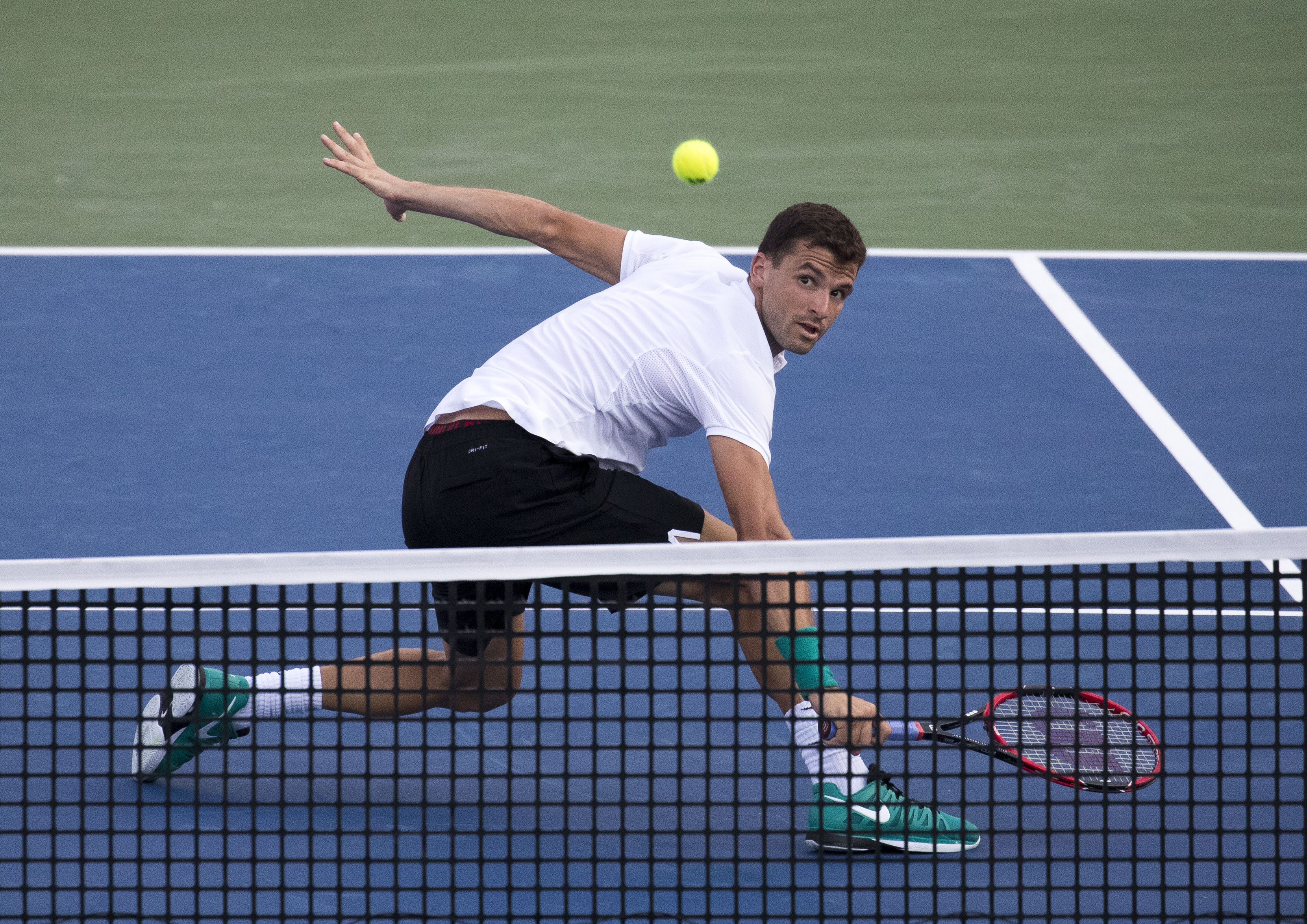 2016 Citi Open